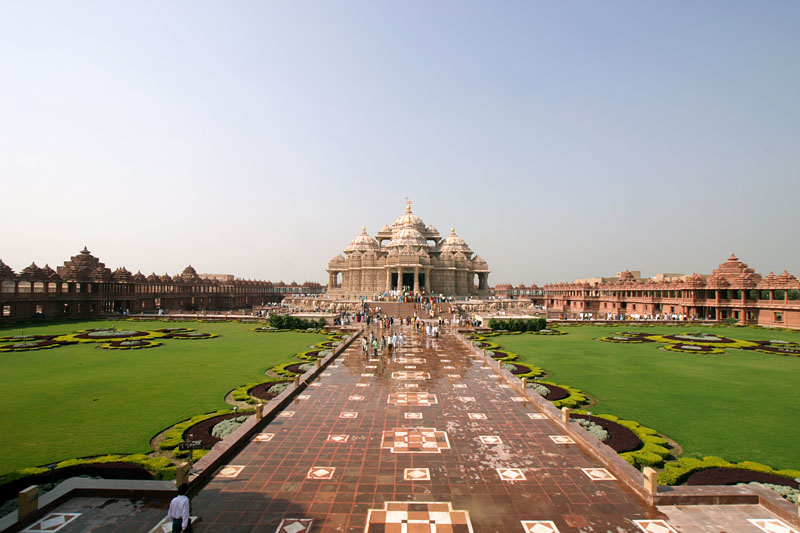 Delhi Akshardham in Delhi, India